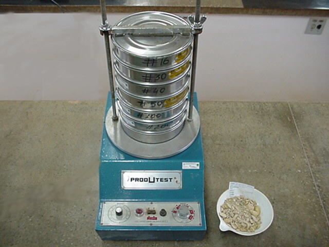 Peneirador mecânico para ensaio de granulometria em solos